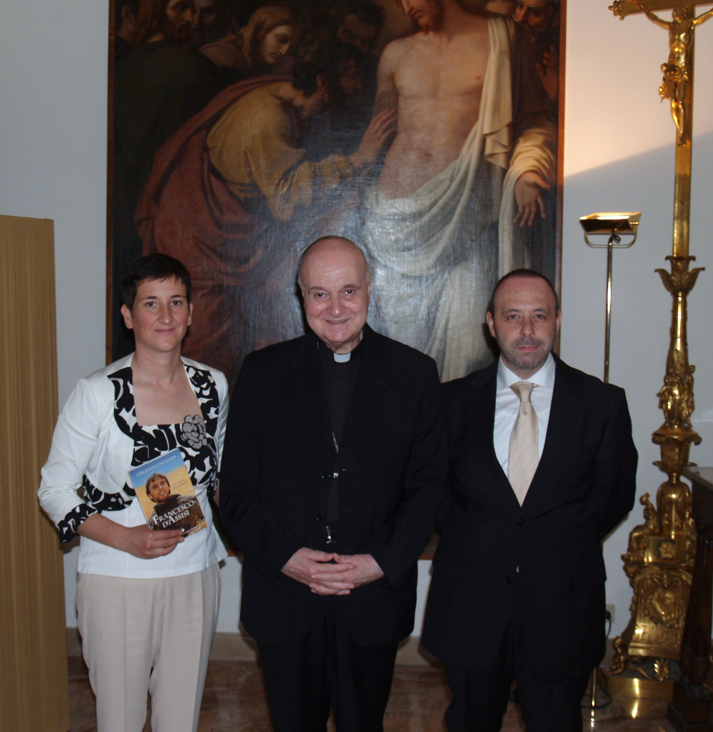 incontro amichevole tra il Card. Angelo Comastri, vicario generale della Città del Vaticano con Bonaldi Cristian e la consorte Samantha Palazzi